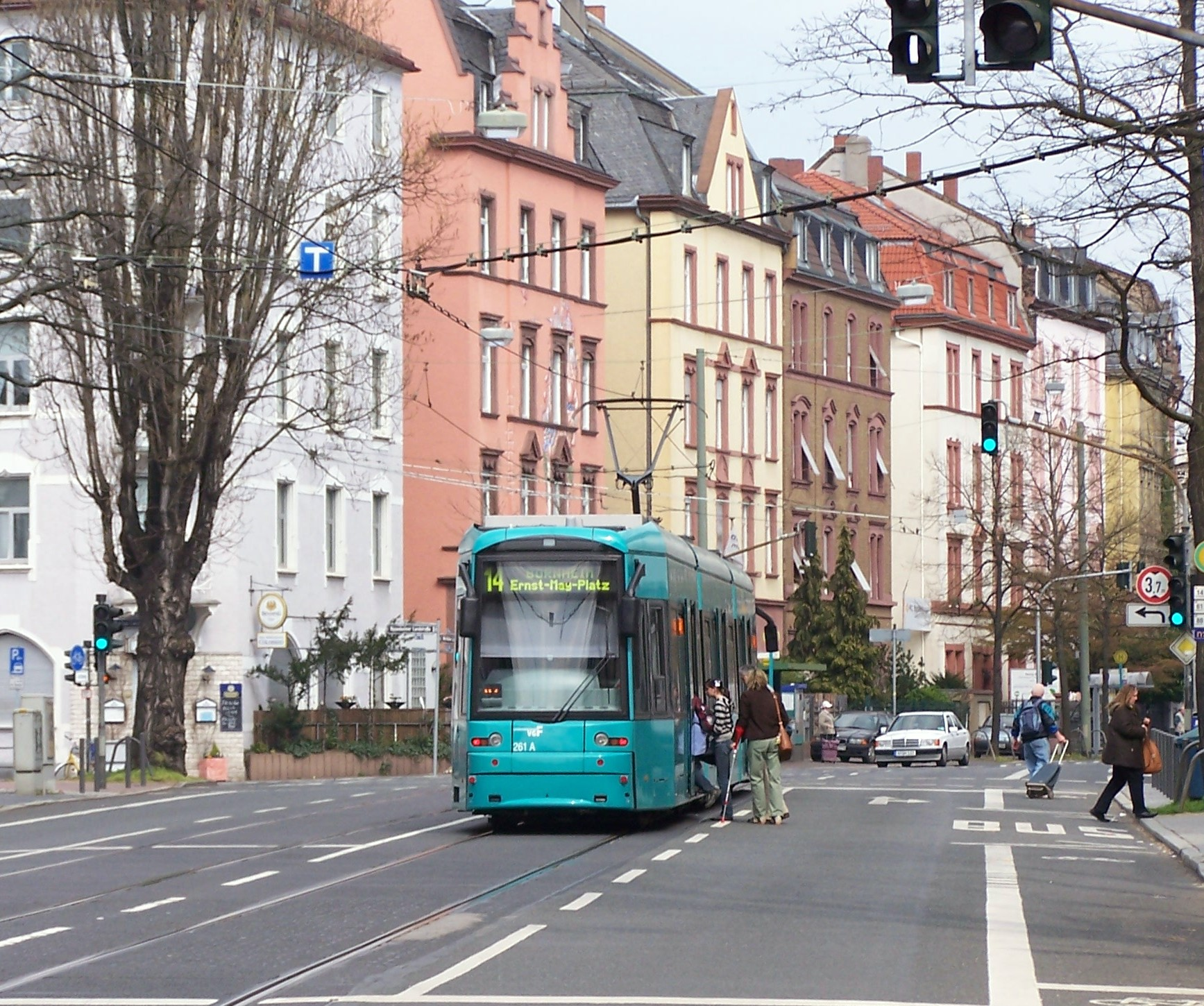 Straßenbahnlinie 14 in der Mörfelder Landstraße an der Haltestelle Oppenheimer Landstraße